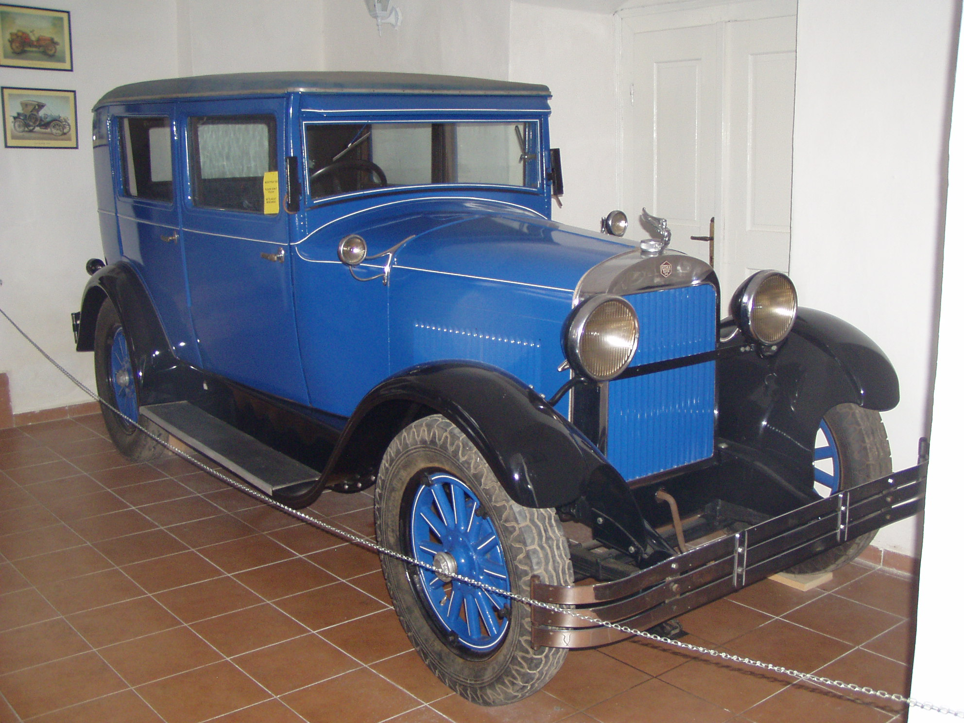 Hudson Essex Super Six (1927)